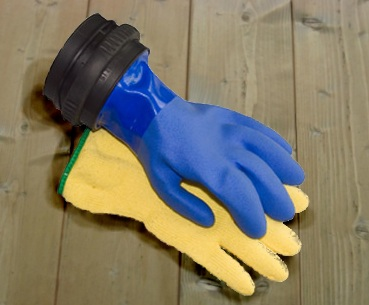 Trockenhandschuh mit Ringsystems und isolierem Innenhandschuh für Taucher